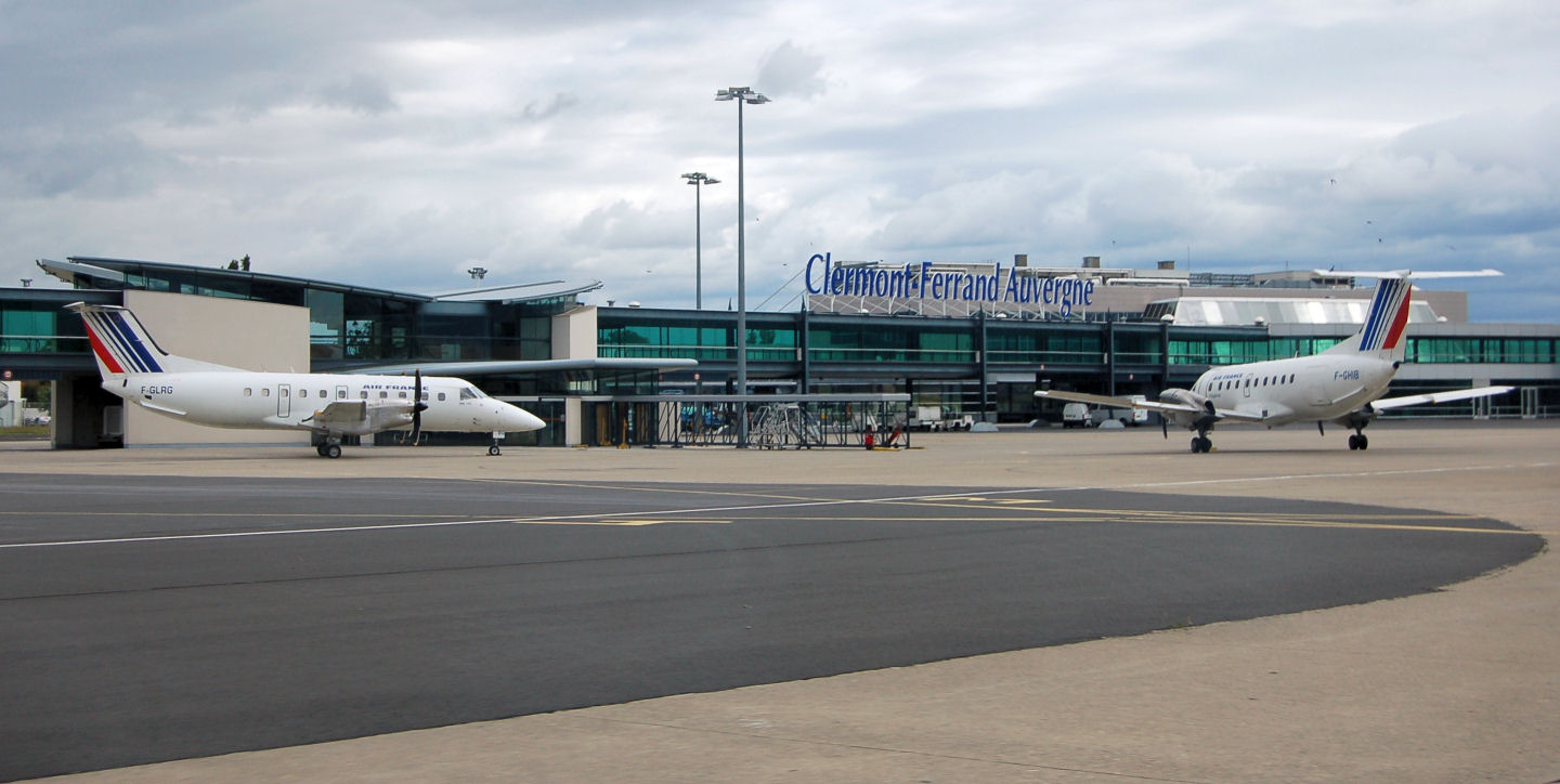 Aéroport de Clermont-Ferrand Auvergne (Aulnat, prés de Clermont-Ferrand, France)